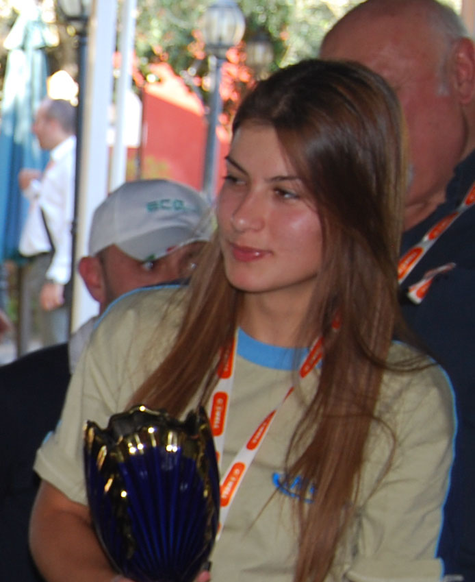 Albanian rally driver Desara Muriqi